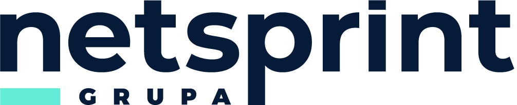 Logo Grupy Netsprint